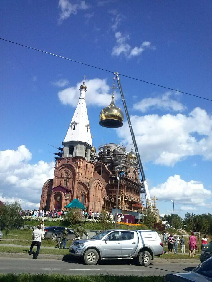 на новую церковь в Центральном микрорайоне города Шелехов водружают главный купол.